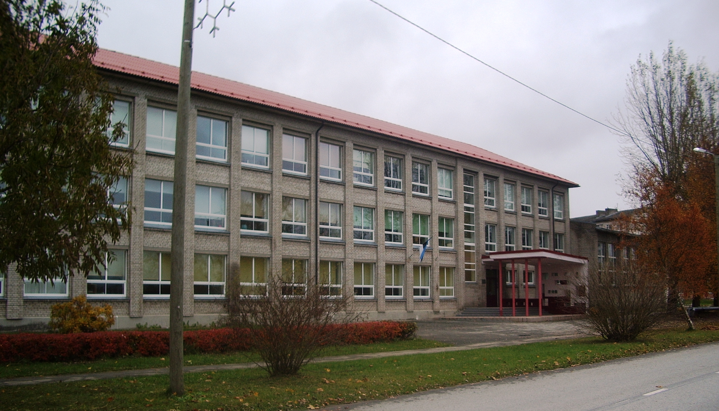 Paldiski Gümnaasium, Rae 56